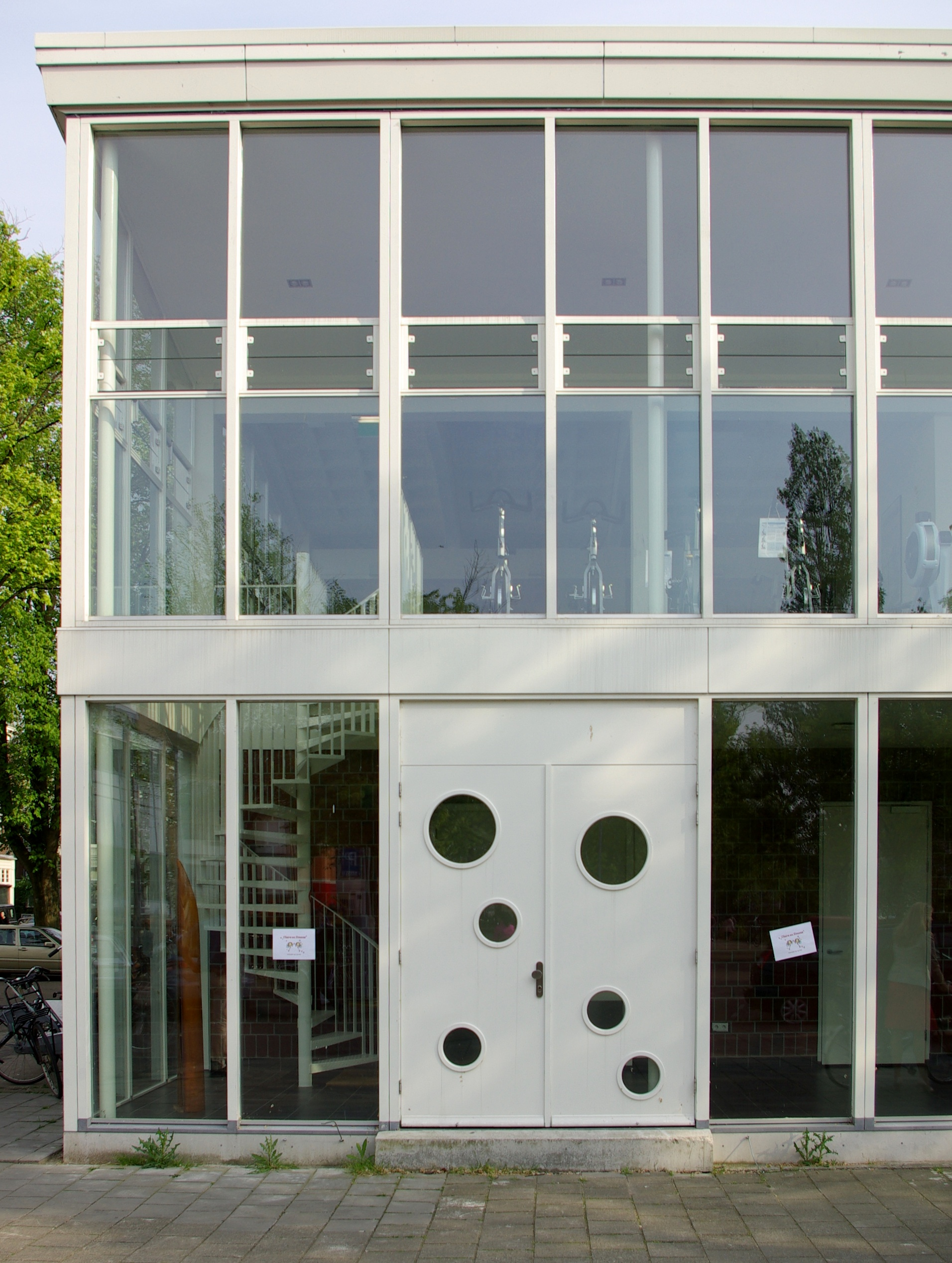 KARZV De Hoop in Amsterdam. (1950-1952, architect: Auke Komter)